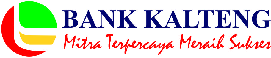 Logo Resmi Bank Kalteng